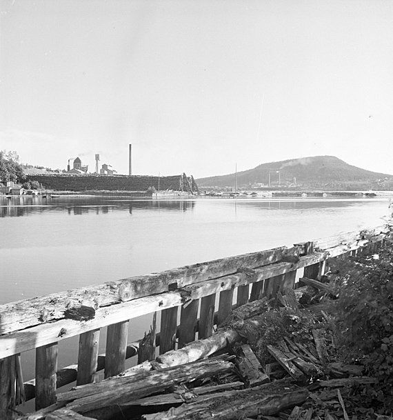 Sågverksruiner. Bild tagen på 1940-talet. Motiv: Klampenborg Nyckelord: Naturreservat Kategori: Sågverk Sågverksruiner. Bild tagen på 1940-talet.